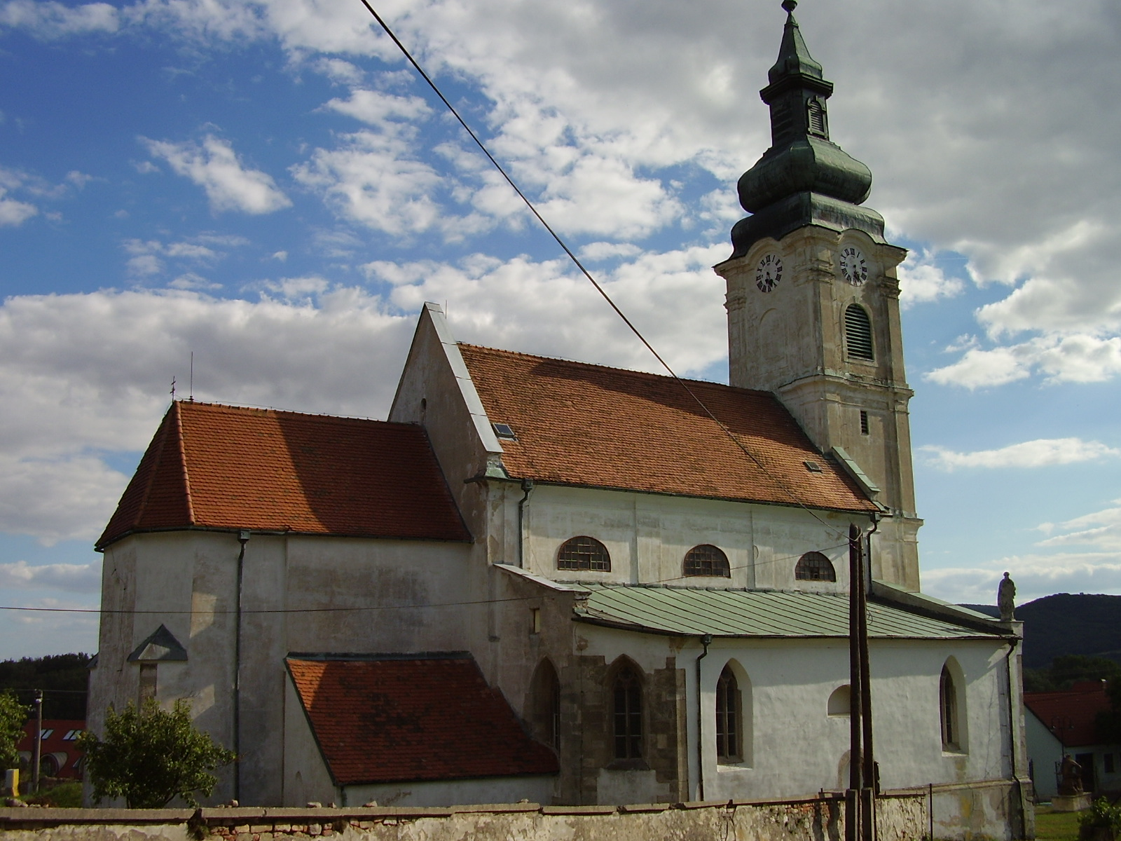 Devínsky kostol